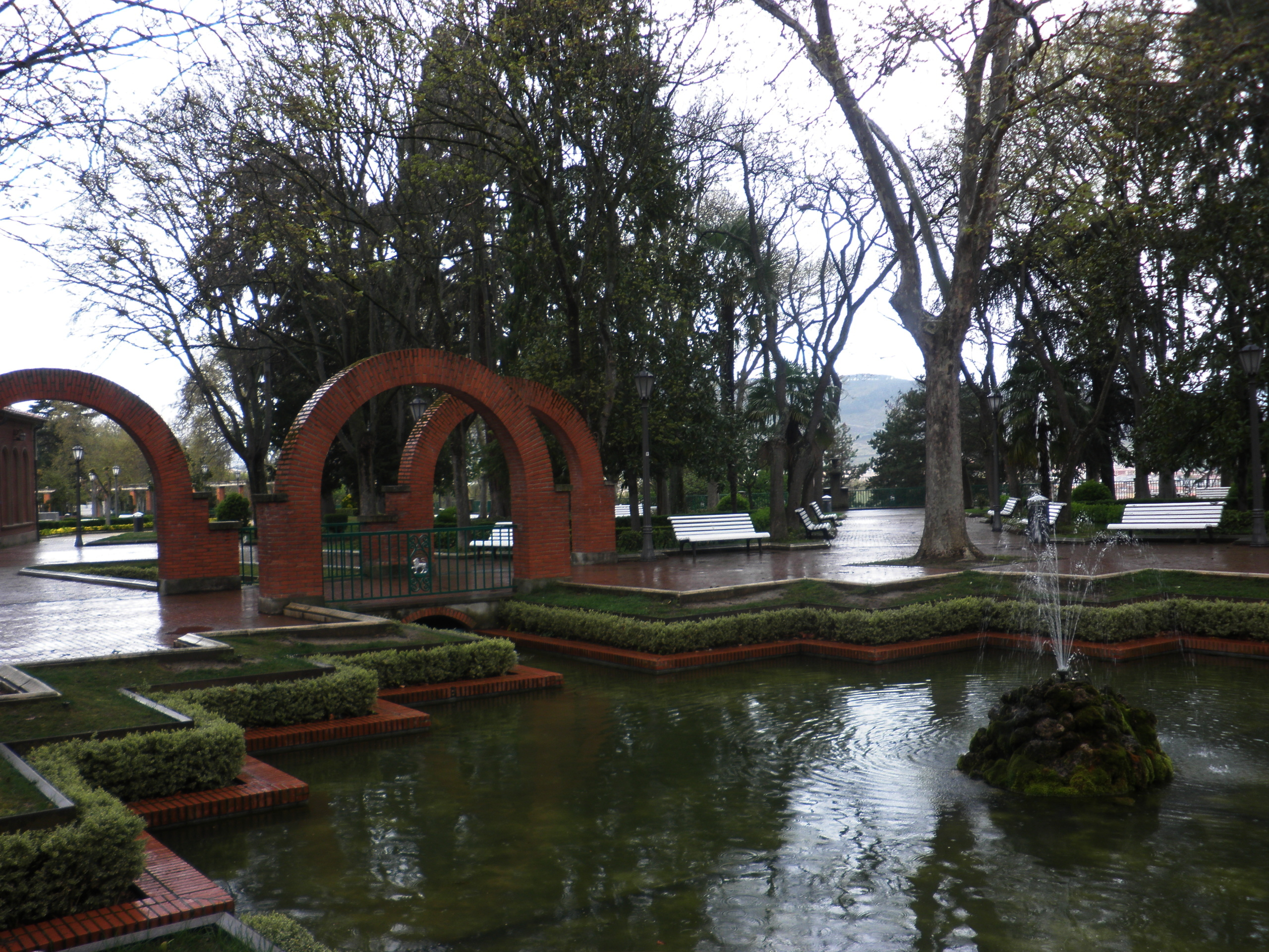 Parque Media Luna, Pamplona